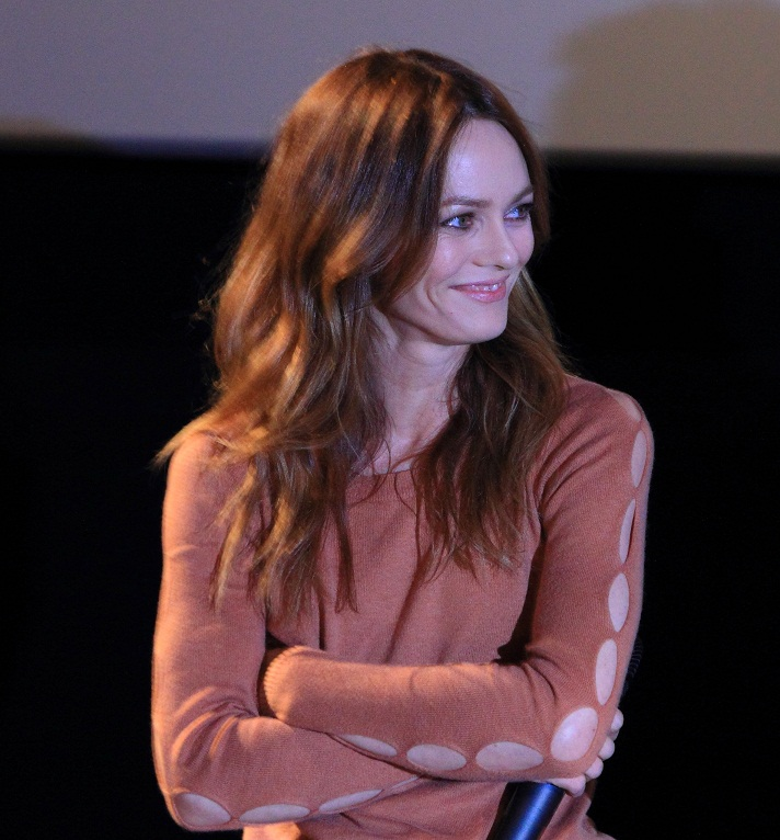 Vanessa Paradis lors de l'avant première de "Café de Flore" le 24 janvier 2012 à Paris, France.